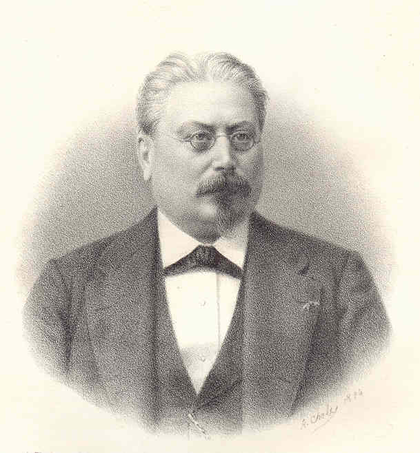 Portrait de Jules-René Bourguignat